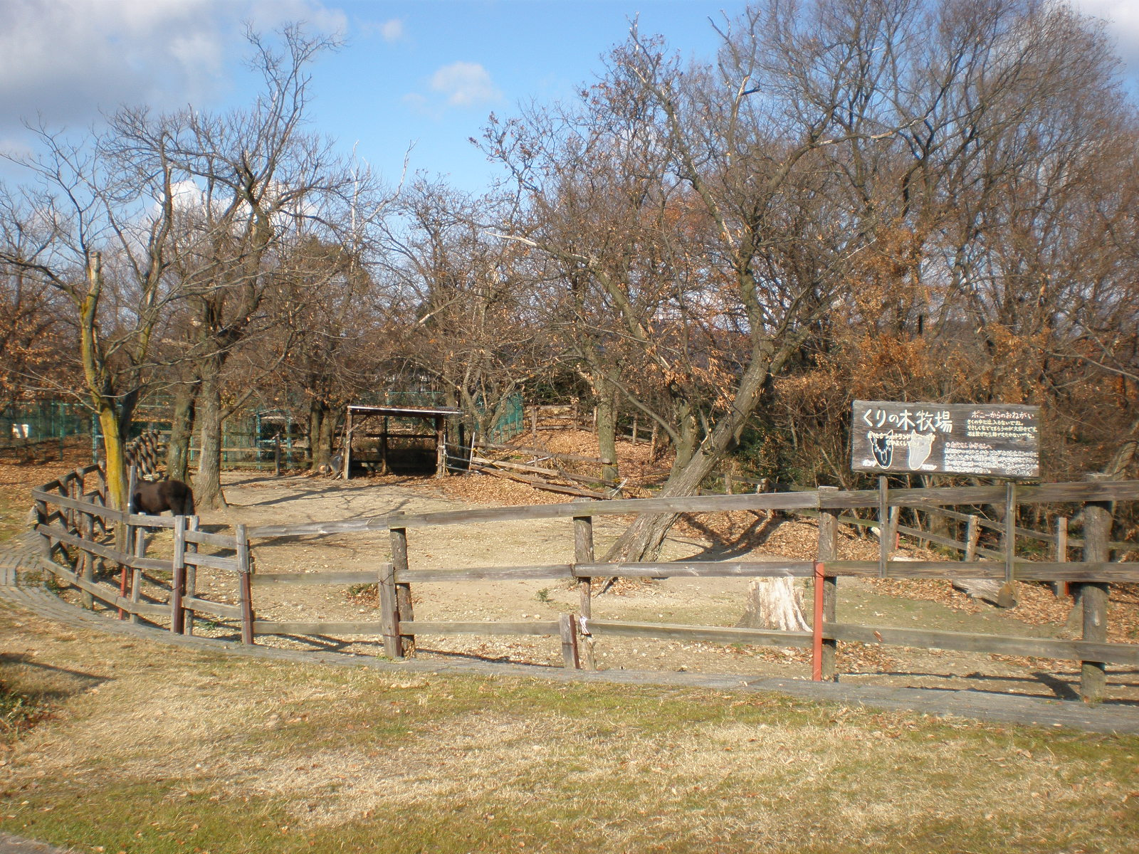 愛知県小牧市にあるくりの木ランチ